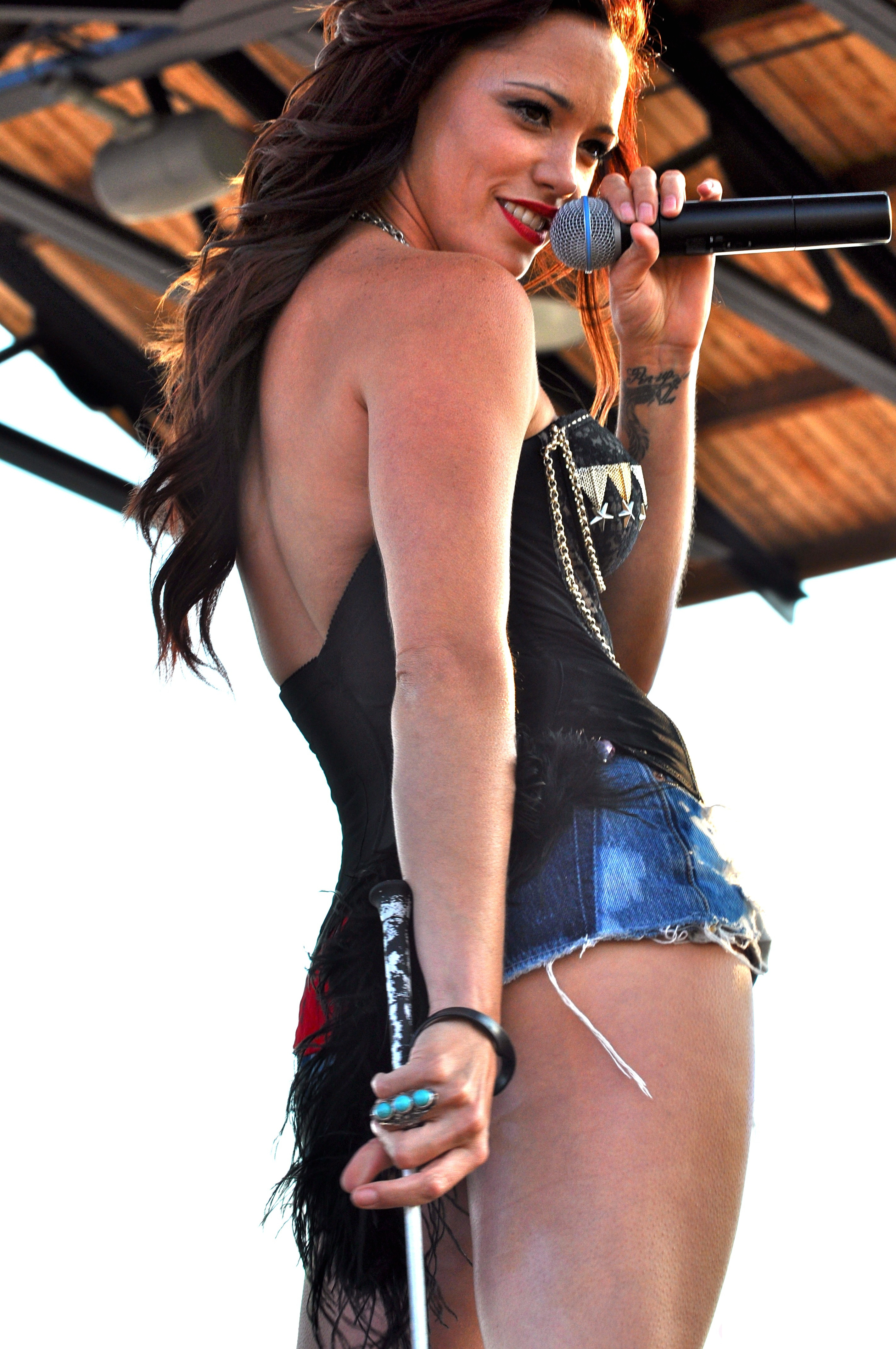 Jessica Sutta - DS Pride -DSC_2503- 9.1.12